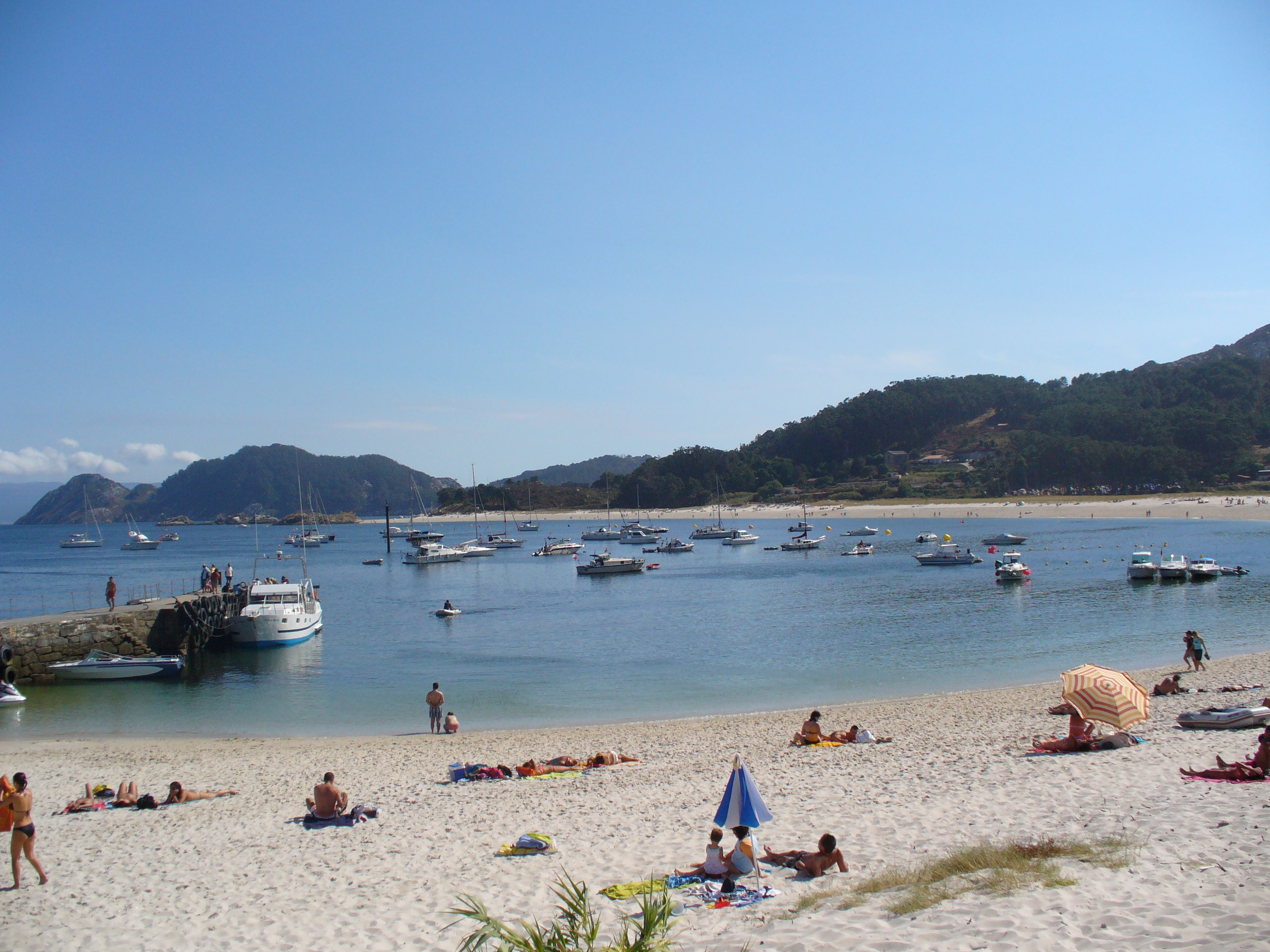 Praia de Rodas - Illas Cíes, Vigo